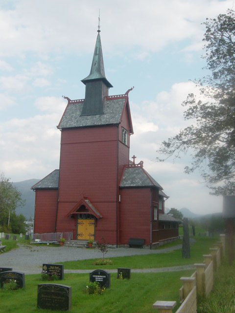 The churche Stemshaug kirke in Norway